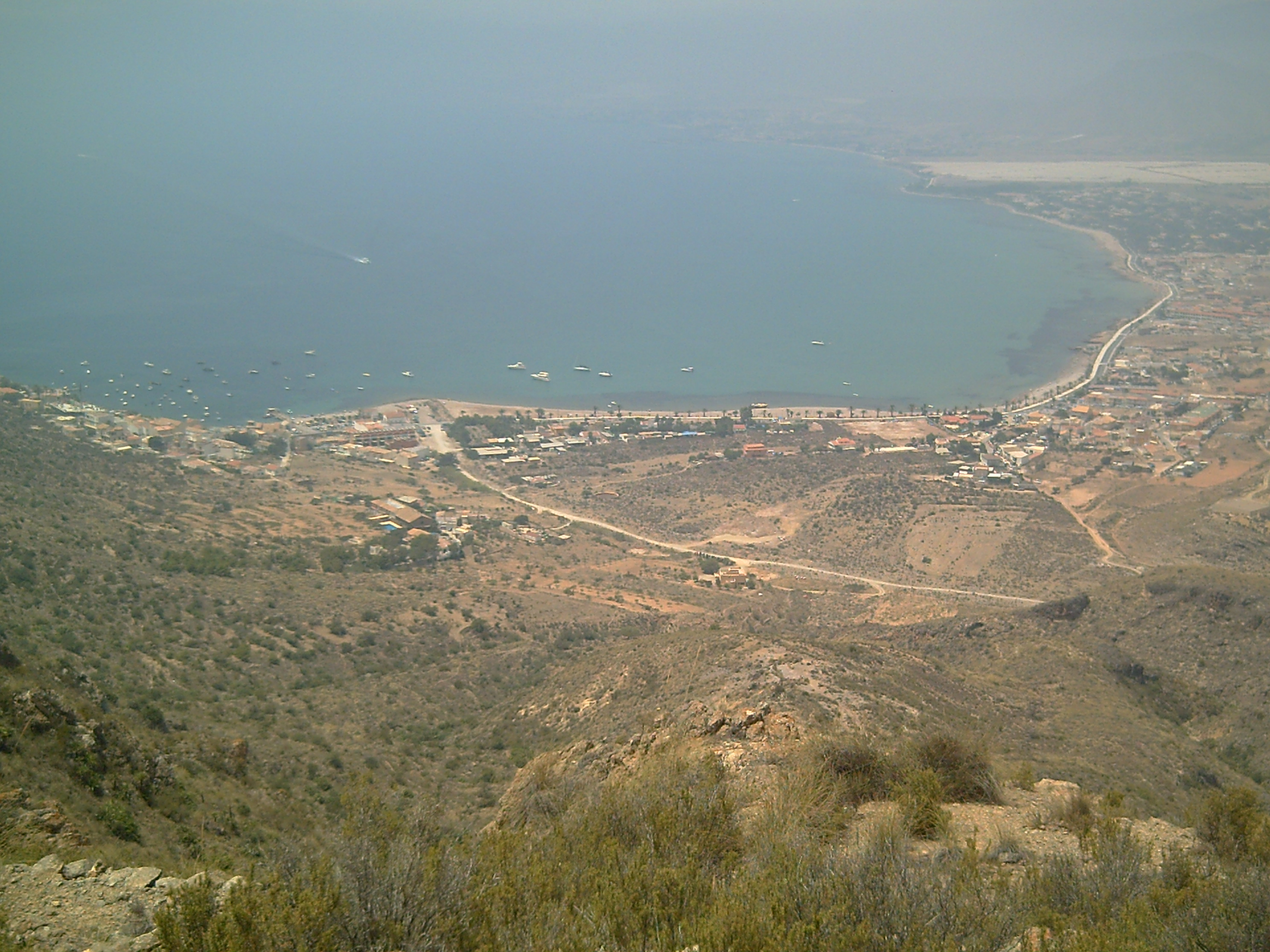 Panorámica de La Azohía e Isla Plana en Cartagena (España))